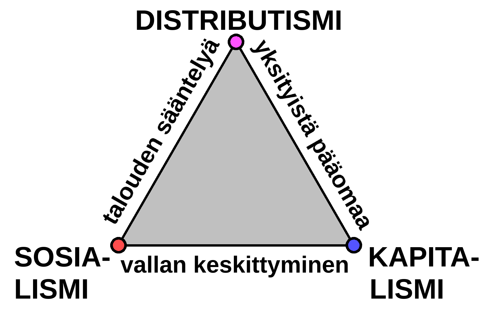 Tämä graafinen esitys pyrkii selventämään sosialismin, kapitalismin ja distributismin suhteita toisiinsa.